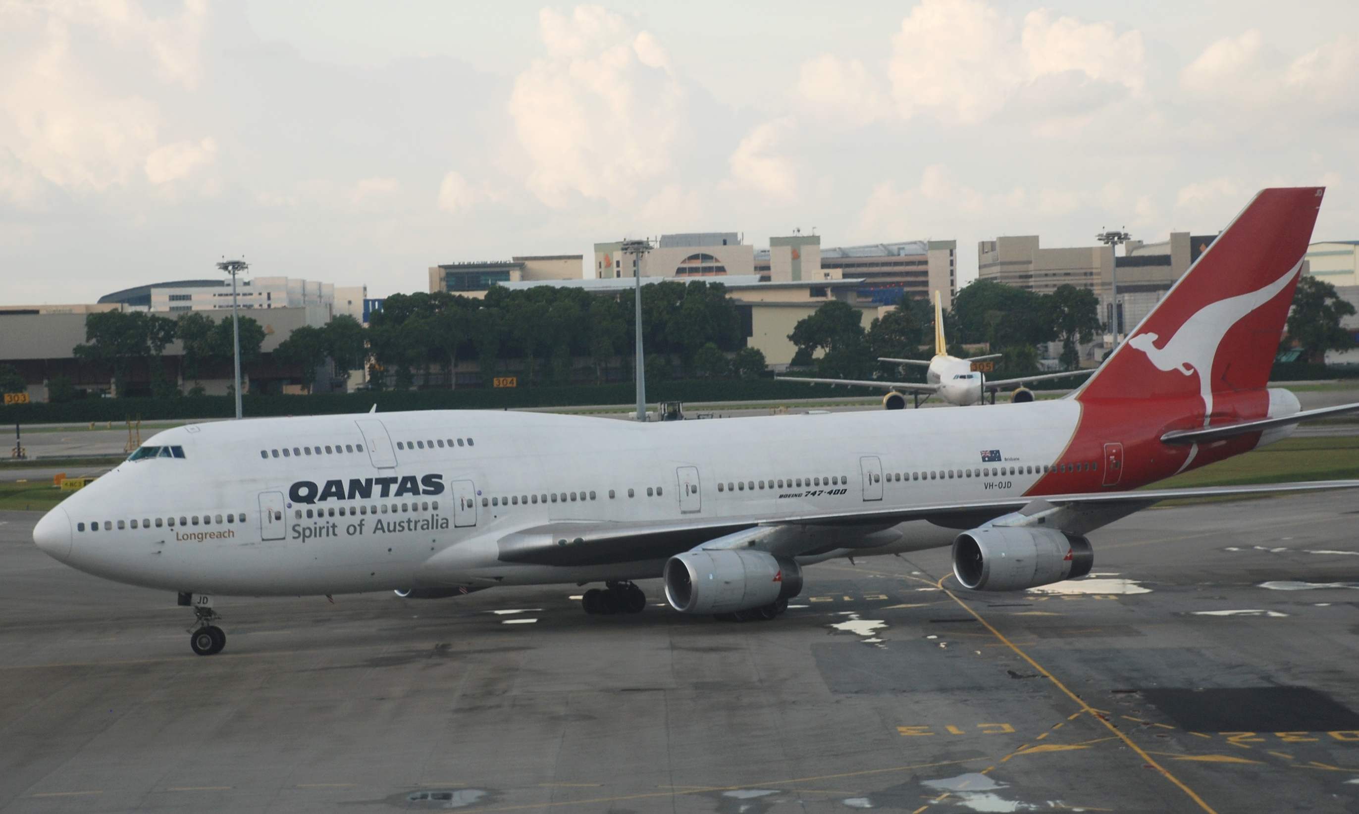 Qantas Boeing 747-400 taxiing (VH-OJD "Brisbane") at Singapore Changi Airport.